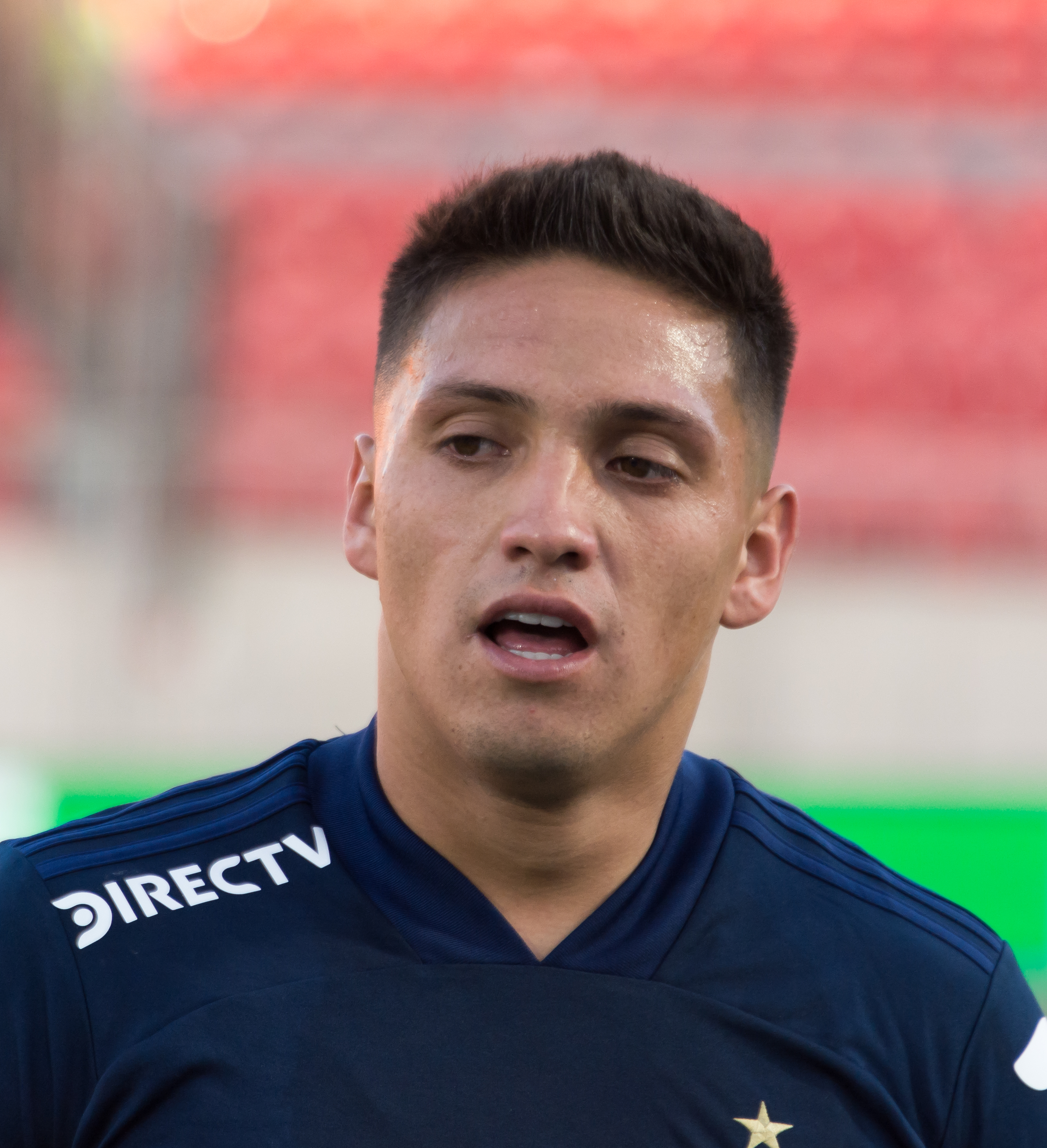 Universidad de Chile v Unión La Calera, Estadio Nacional, Ñuñoa, Santiago, Región Metropolitana, Chile